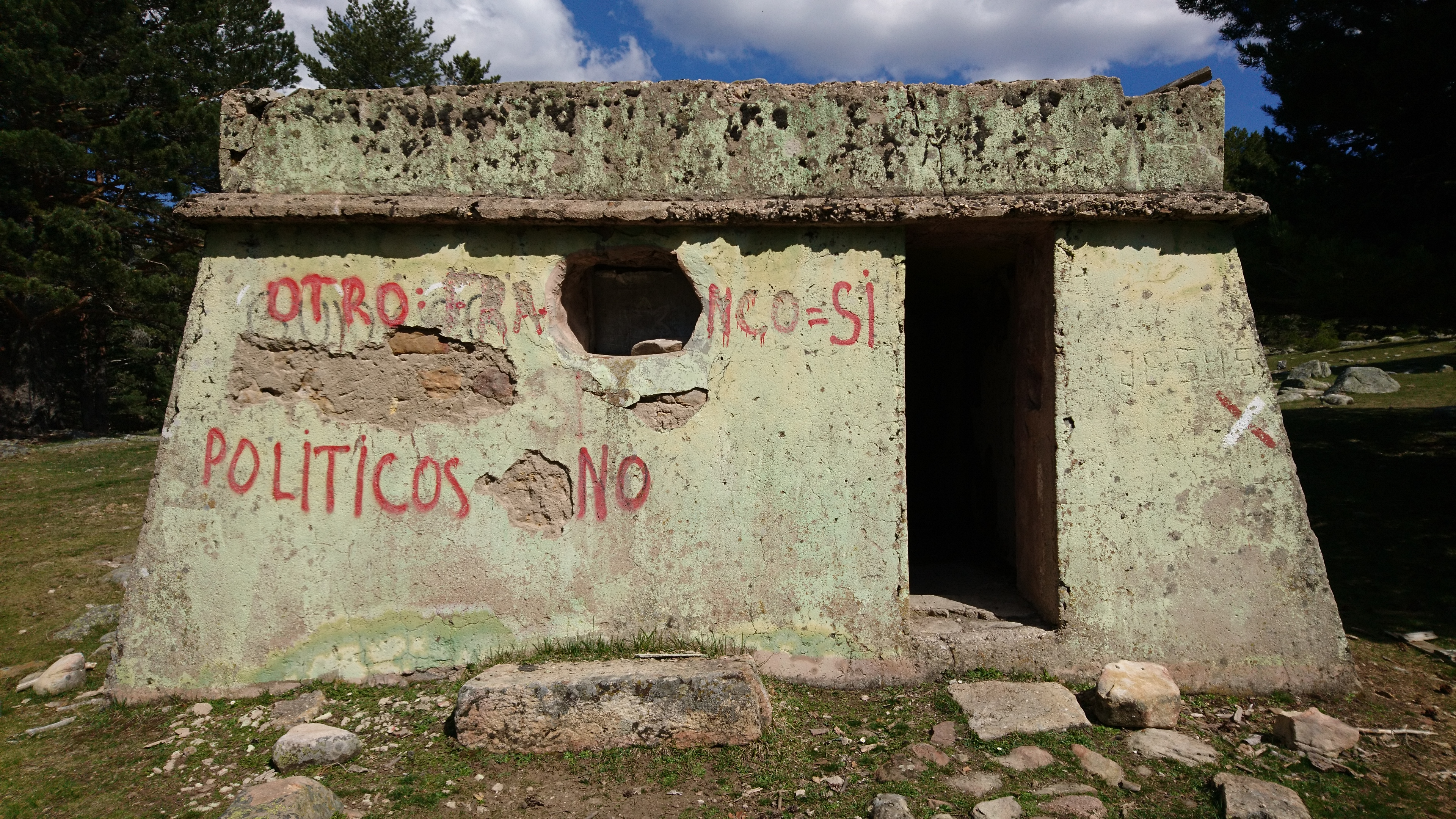 Refugio del Búnker de Peñas Blancas en Duruelo de la Sierra (Soria)